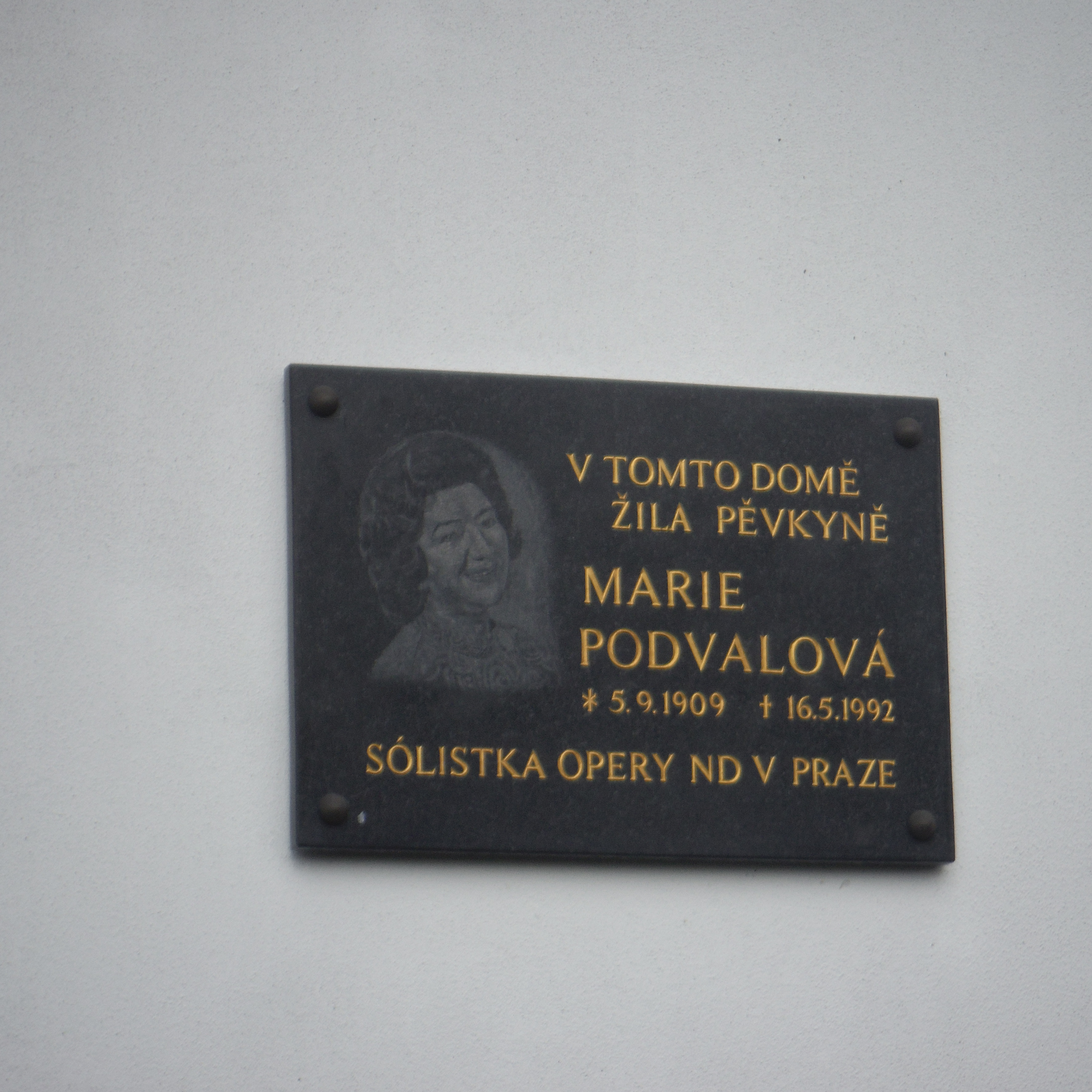 deska